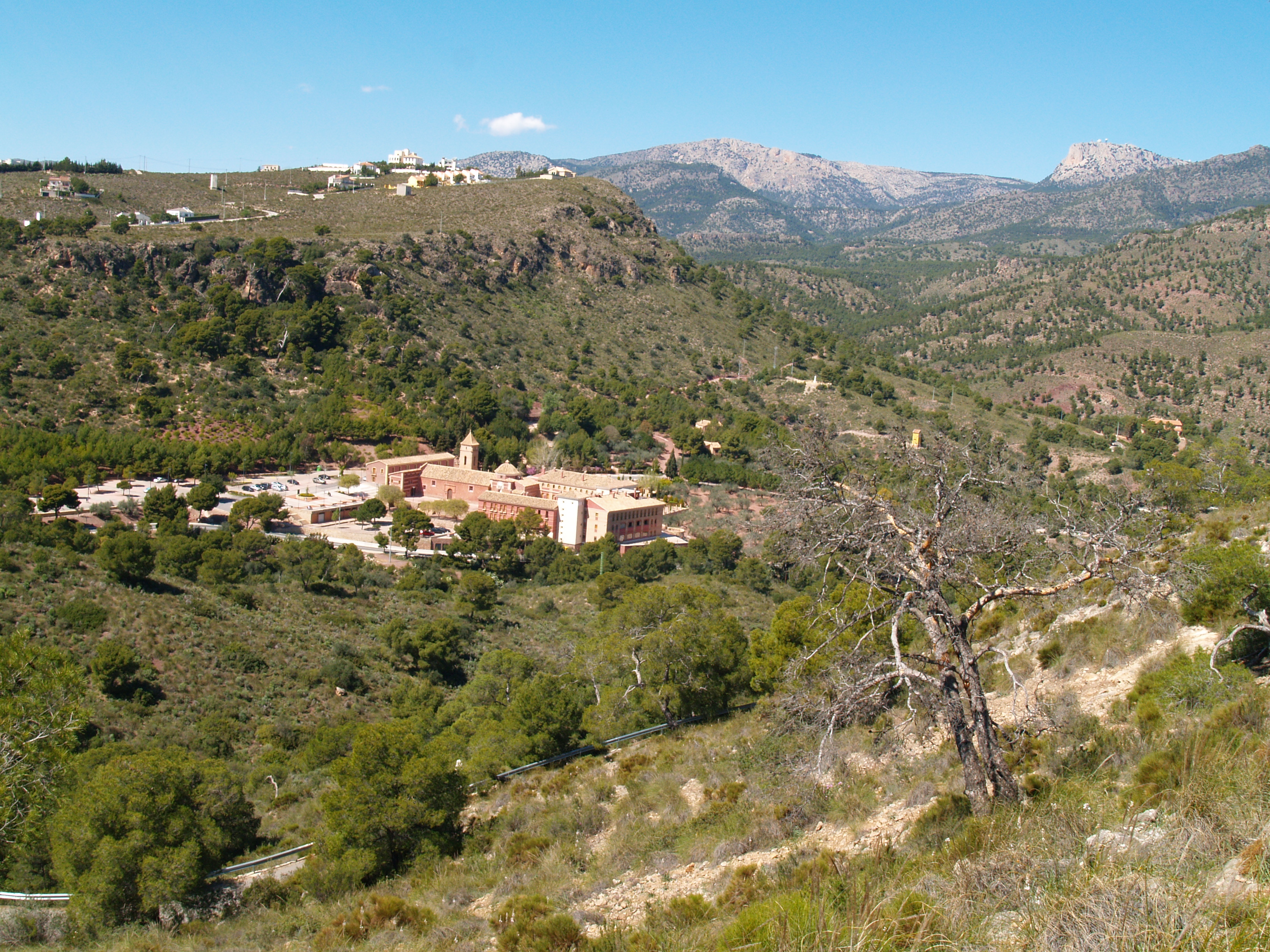 Sierra Espuña y el pico del Morrón al fondo.